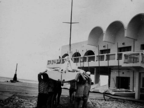 Photo de la base nautique de Zembra (années 1964-1972).